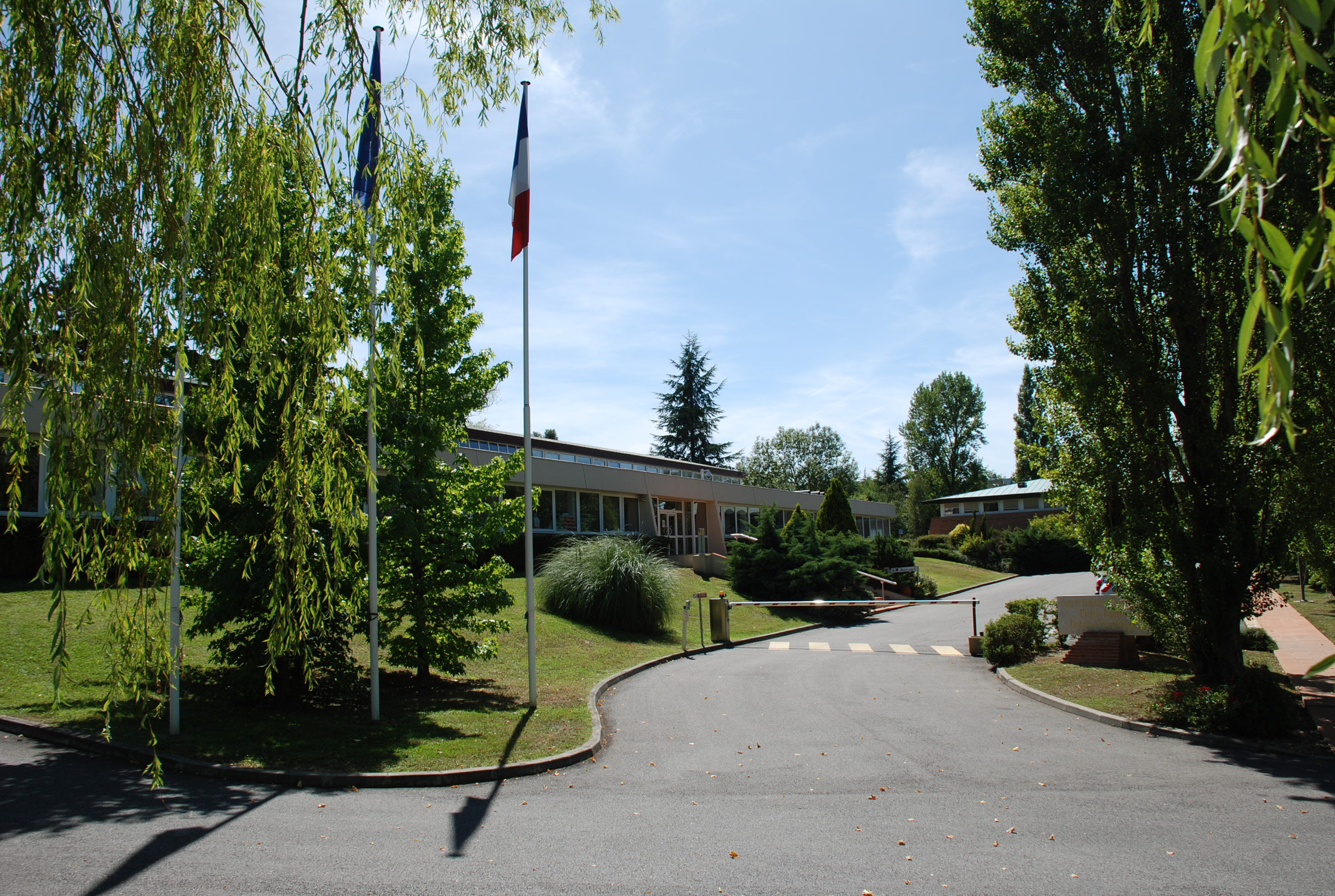 Entrée des Laboratoires Pierre Fabre à Vigoulet-Auzil (Haute-Garonne, France).